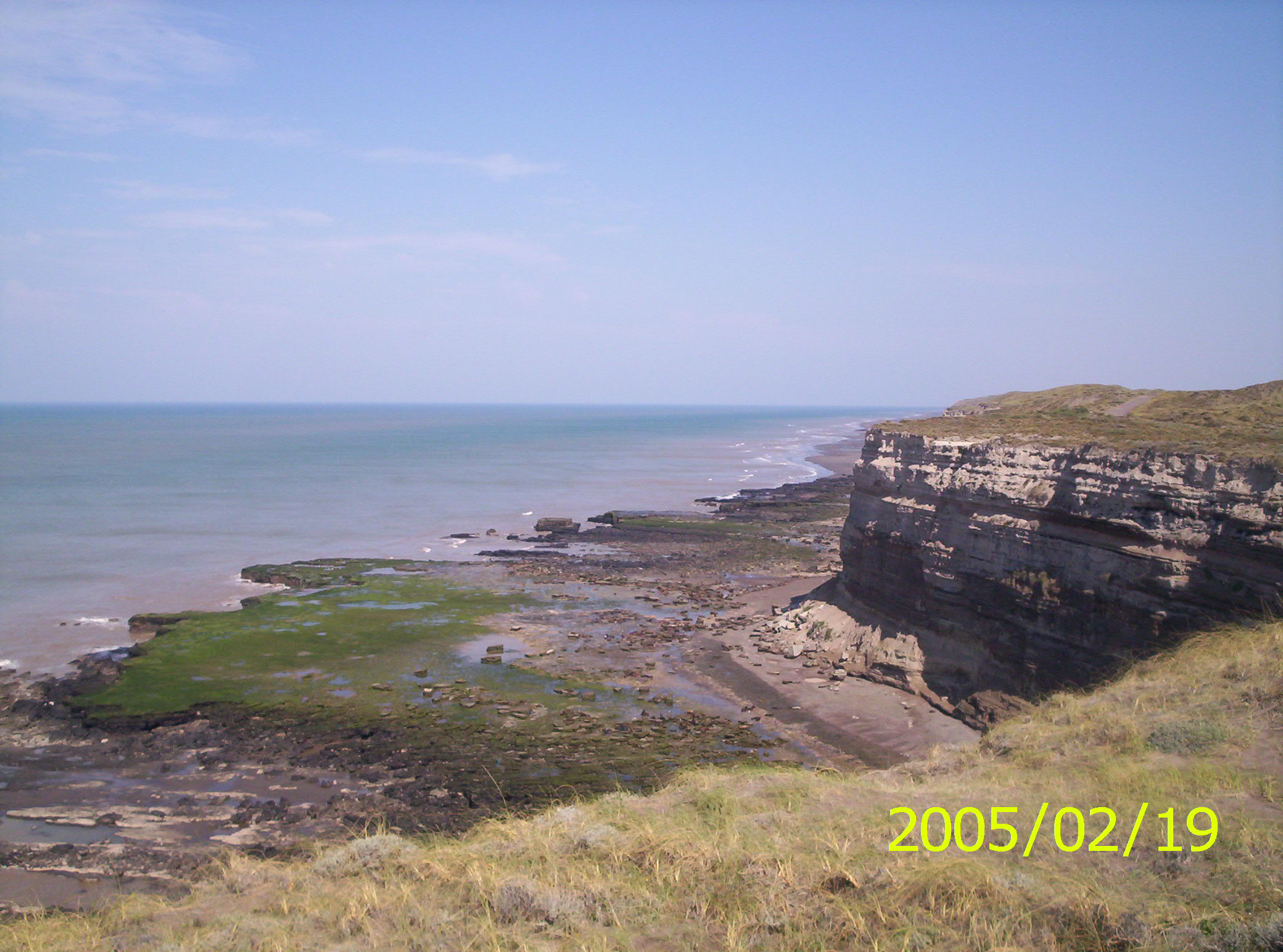 Las costas marítimas de la provincia de Río Negro, tiene zona de médanos como también imponentes acantilados.